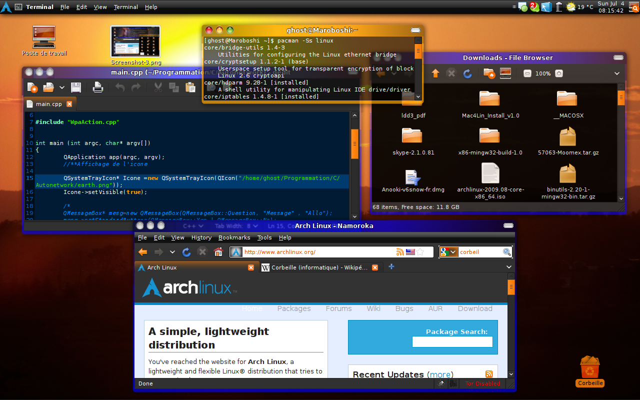 Copie écran du système d'opération Arch Linux. Présentant l'interface Gnome.